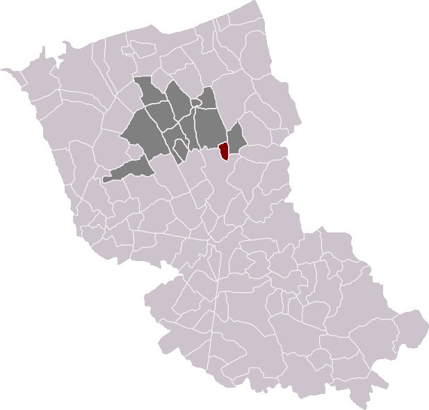 Locatie gemeente Wilder in arrondissement Duinkerke. Zelfgemaakt. Location of Wylder municipality in the arrondissement of Dunkirk. Self made. Localisation de la commune de Wylder dans l'arrondissement de Dunkerque. Fait moi-même.